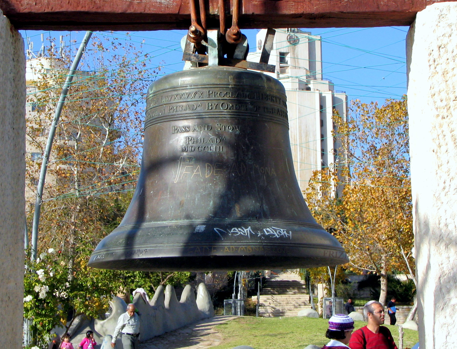 פעמון הדרור בגן הפעמון